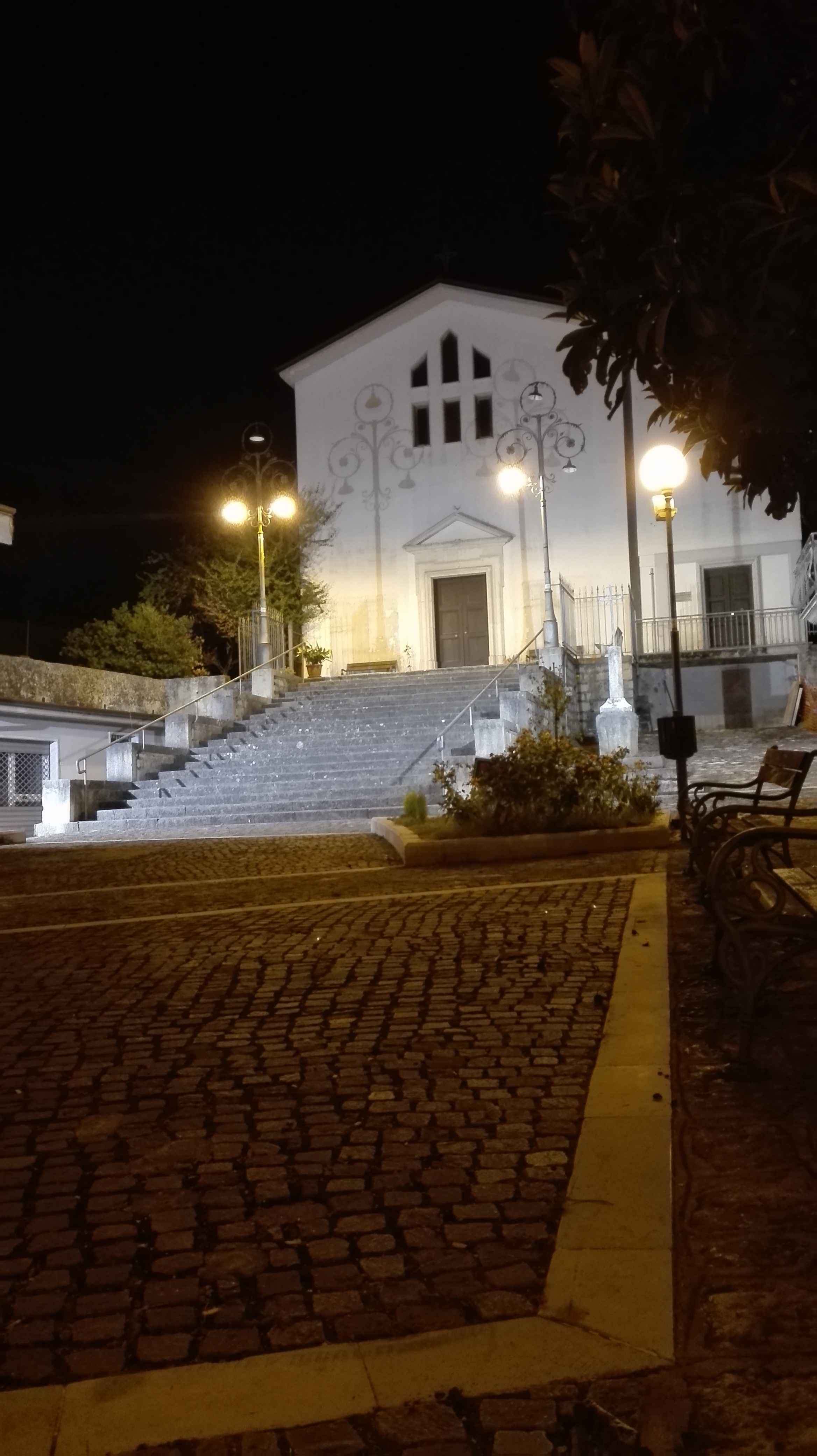 Chiesa di Santa Croce vista da Piazza Sant'Elena